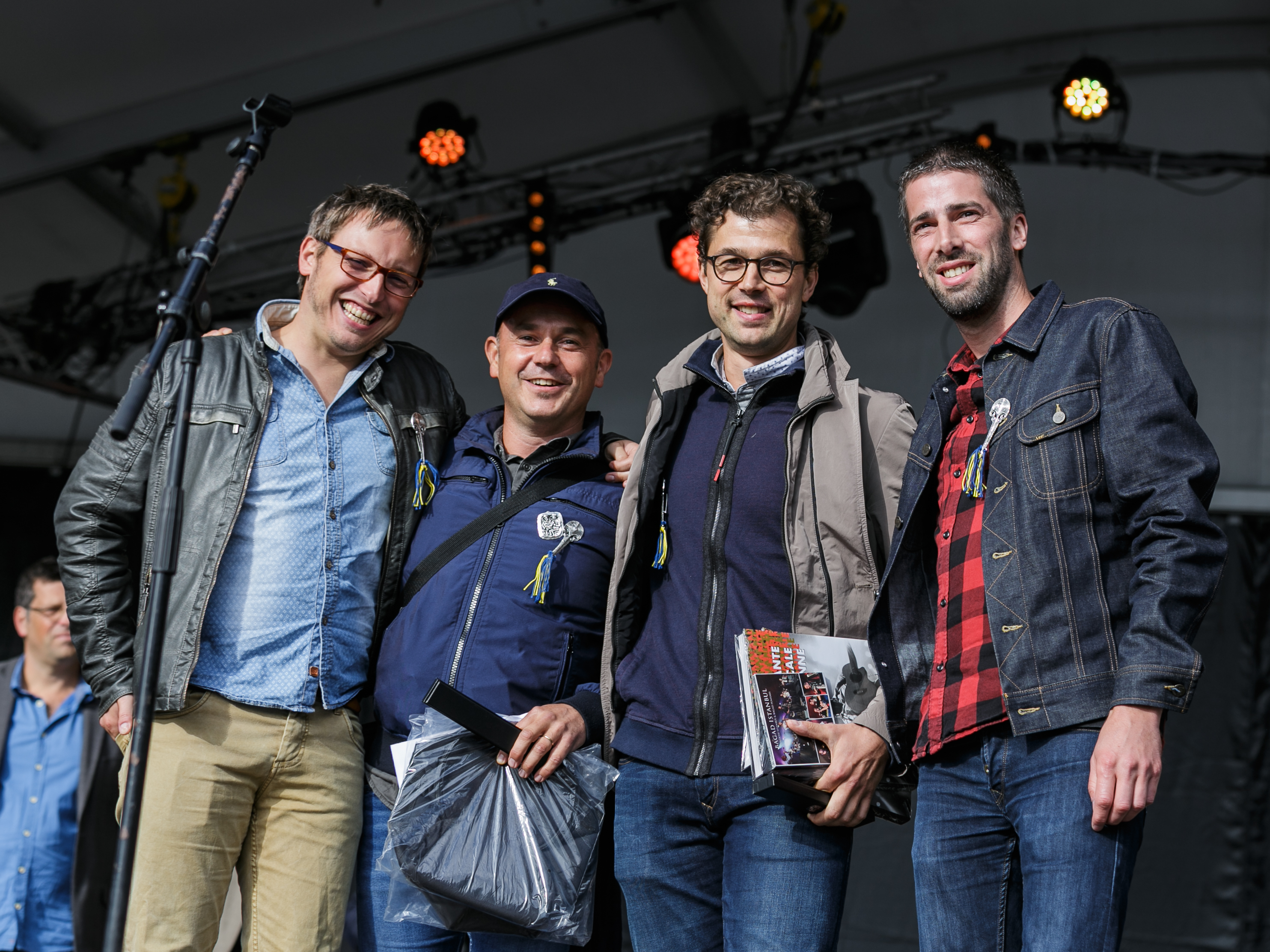 Annonce des résultats du trophée Plume de Paon lors du Festival de Cornouaille à Quimper le 22 juillet 2017.